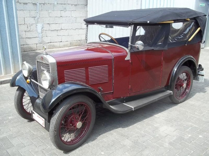 3 Gang 4 Zylinder 80km/h